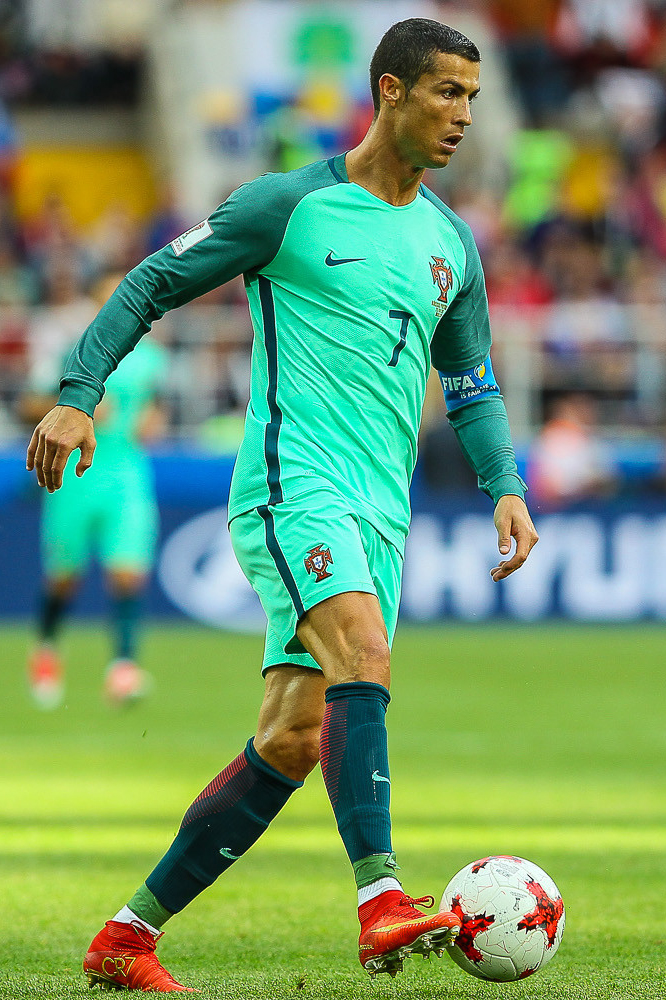 Россия - Португалия